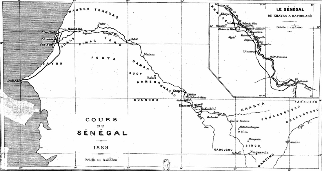 "Cours du Sénégal, 1889" dans Eugène Béchet, Cinq Ans de séjour au Soudan français, E. Plon, Nourrit, Paris, 1889, après la page 270